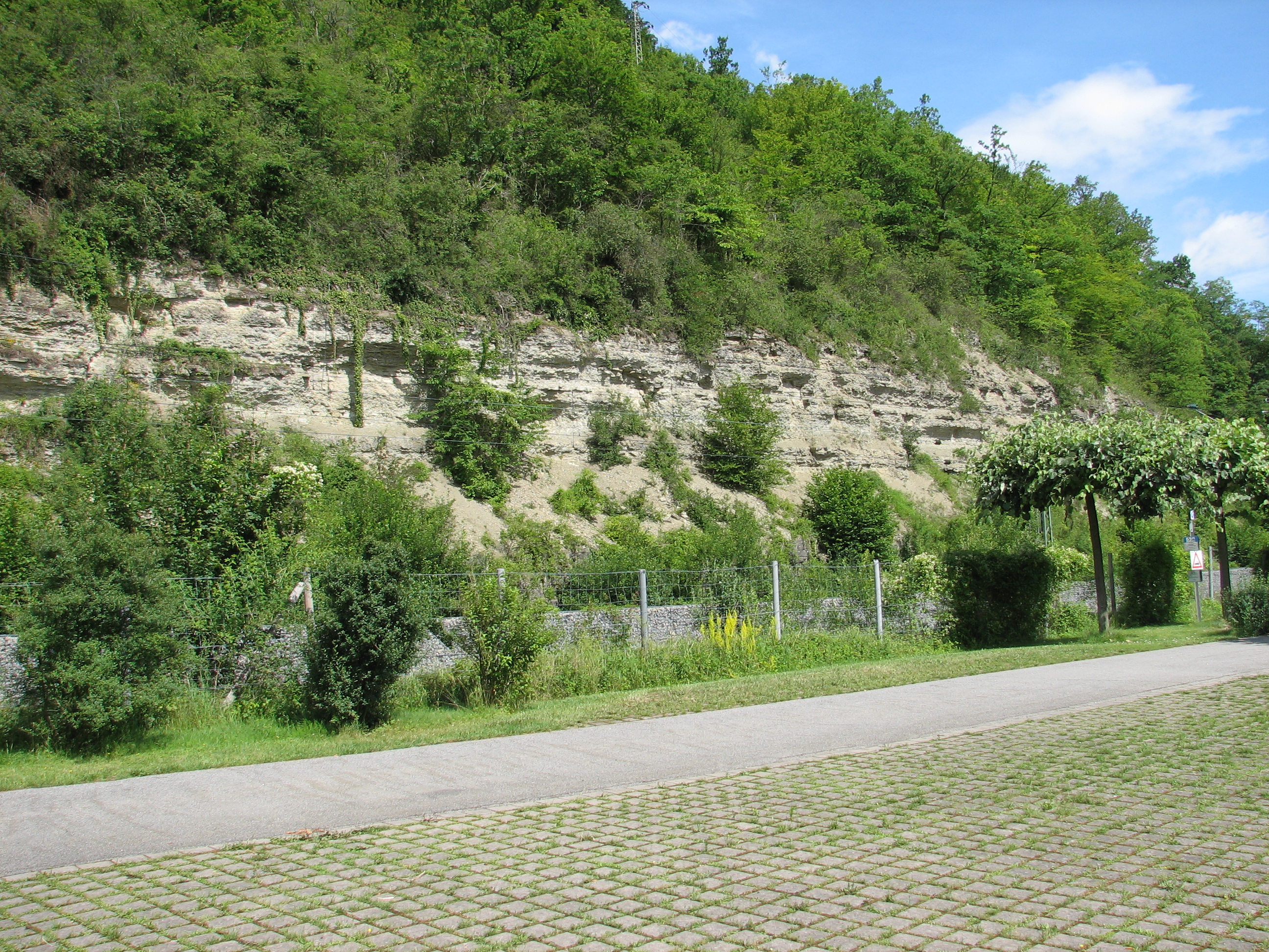 Aufschluss im Muschelkalk bei Mosbach